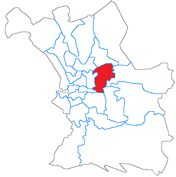 Situation du canton dans la ville de Marseille